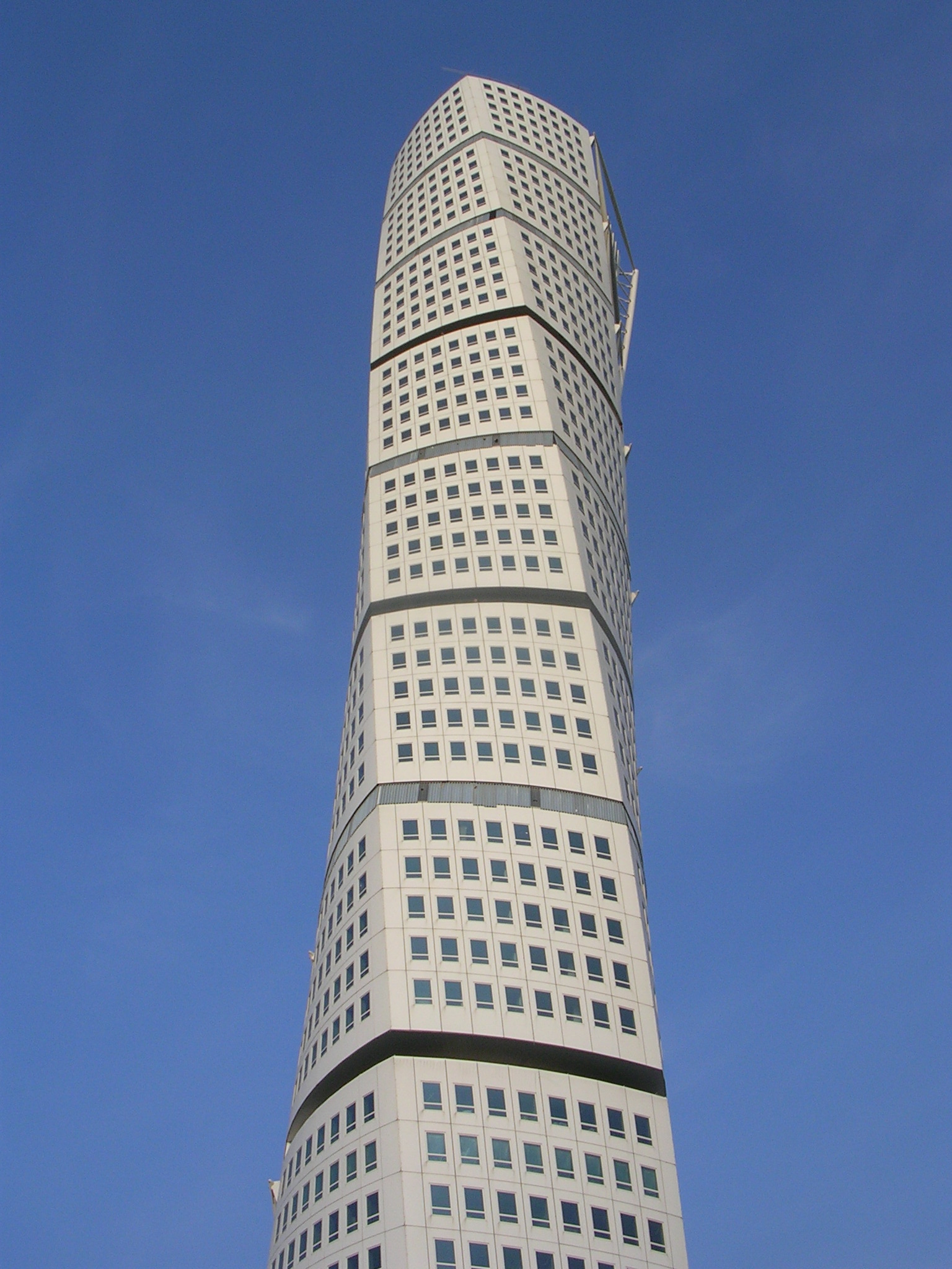 Turning Torso in Malmö. Date: September 2001 Author: Väsk